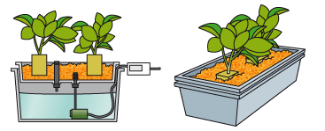 «Периодика» или система периодического затопления замечательно обогащает кислородом корневую зону с помощью компрессора.